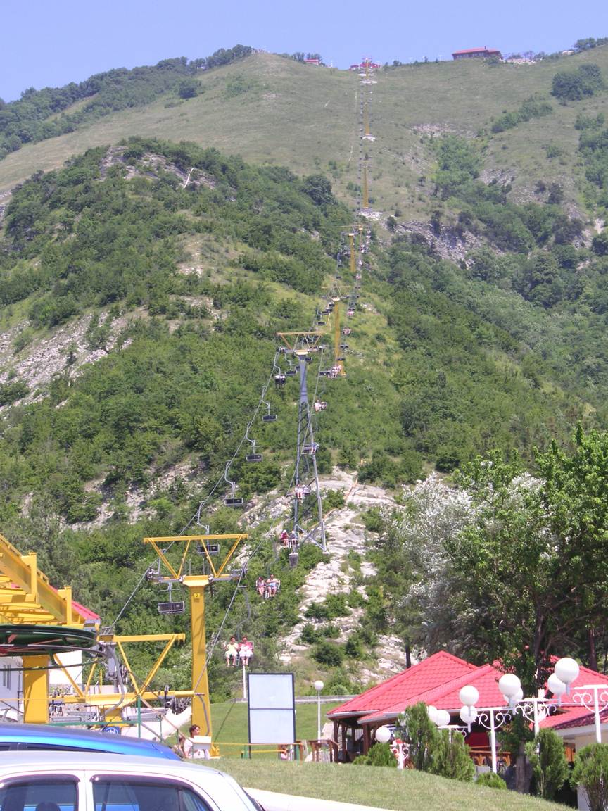 Геленджикская восточная канатная дорога (вид снизу). Склоны Маркотхского горного хребта, с проложенной по ним канатной дорогой